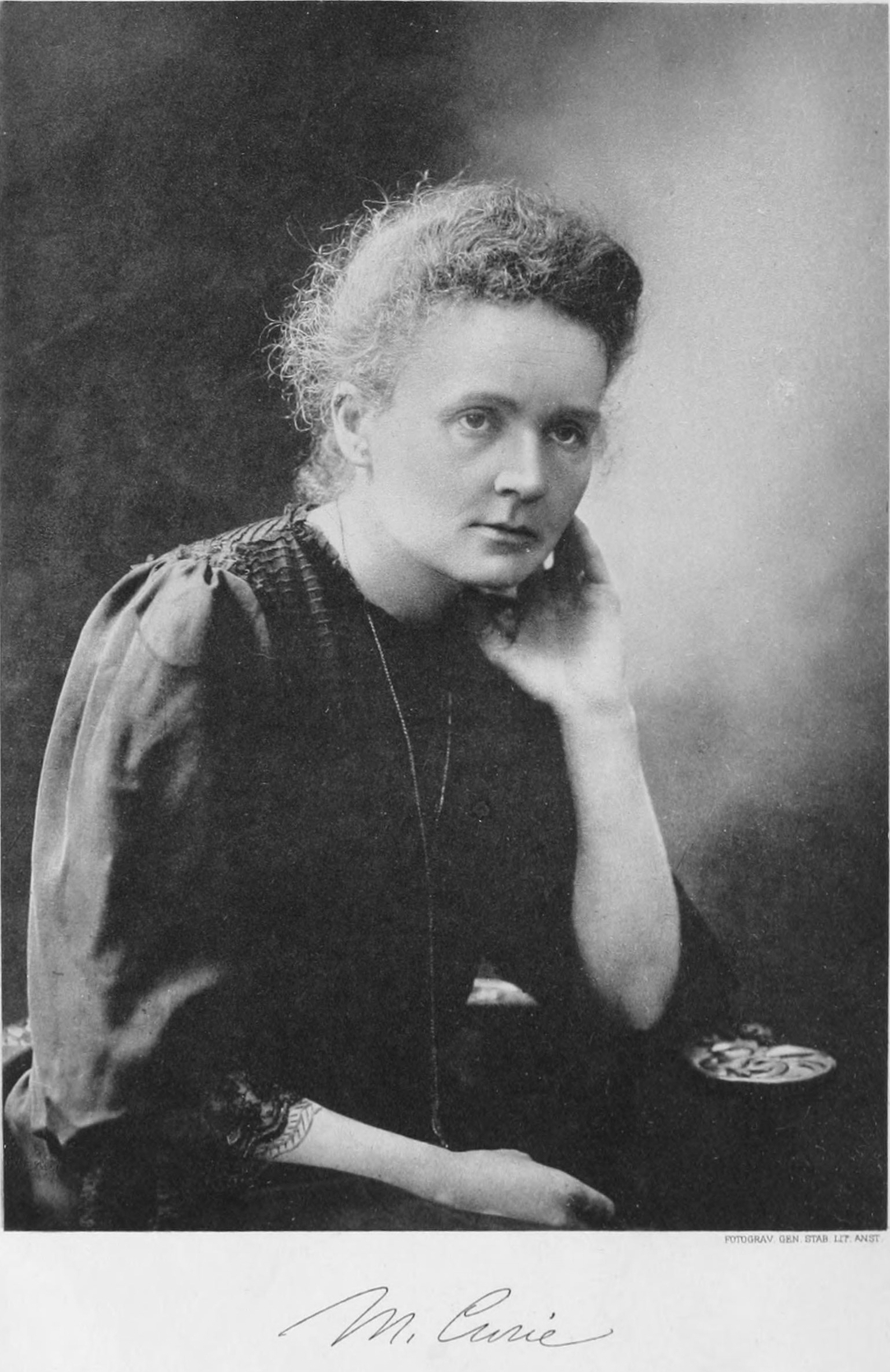 Marie Curie, cropped from File:Curie-nobel-portrait-2-600.jpg